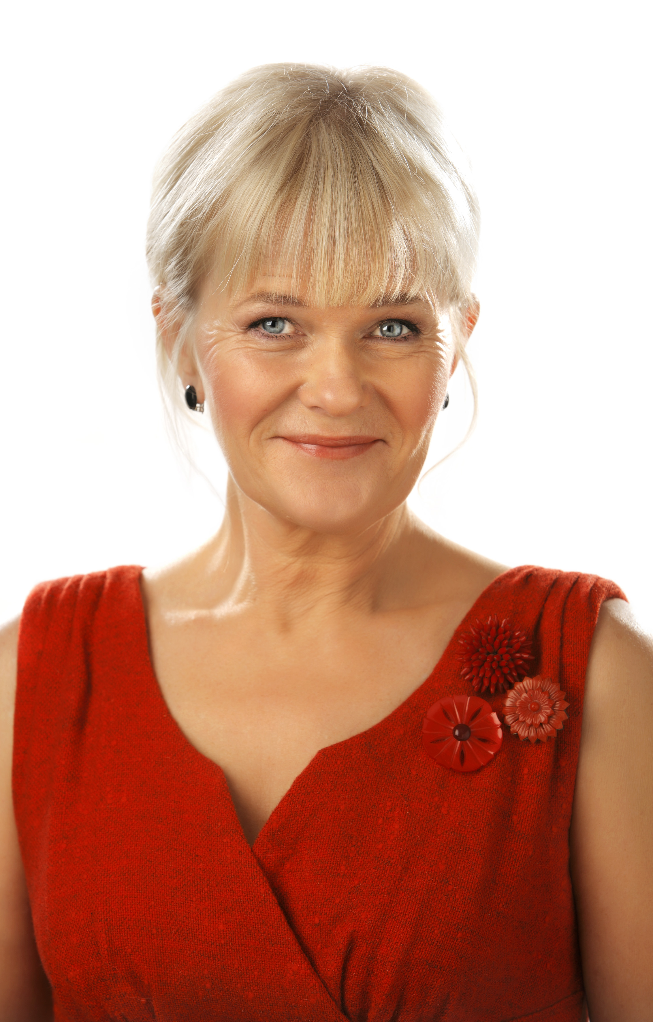 Skådespelerskan Sissela Kyle.